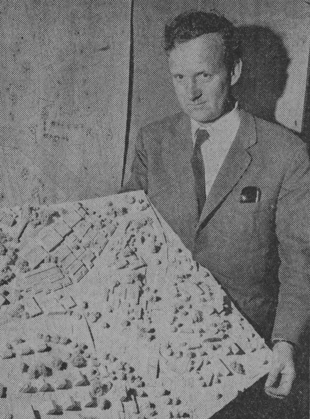 Sten Samuelson med tävlingsförslag över utformningen av centrala Lidingö